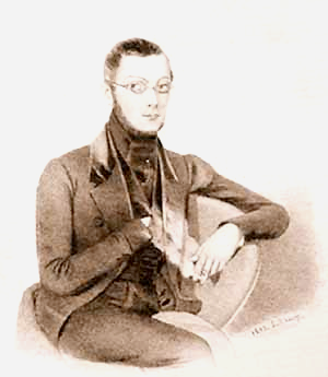 Nikolay Ivanovich Pavlishev